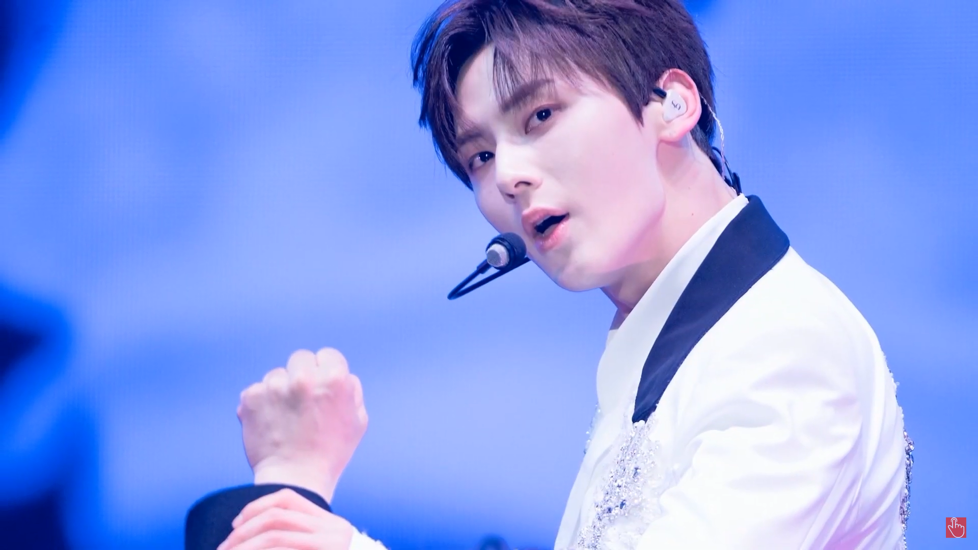 뉴이스트(NU'EST) 민현(MINHYUN) 디스패치HD 대방출 포토 슬라이드 #4